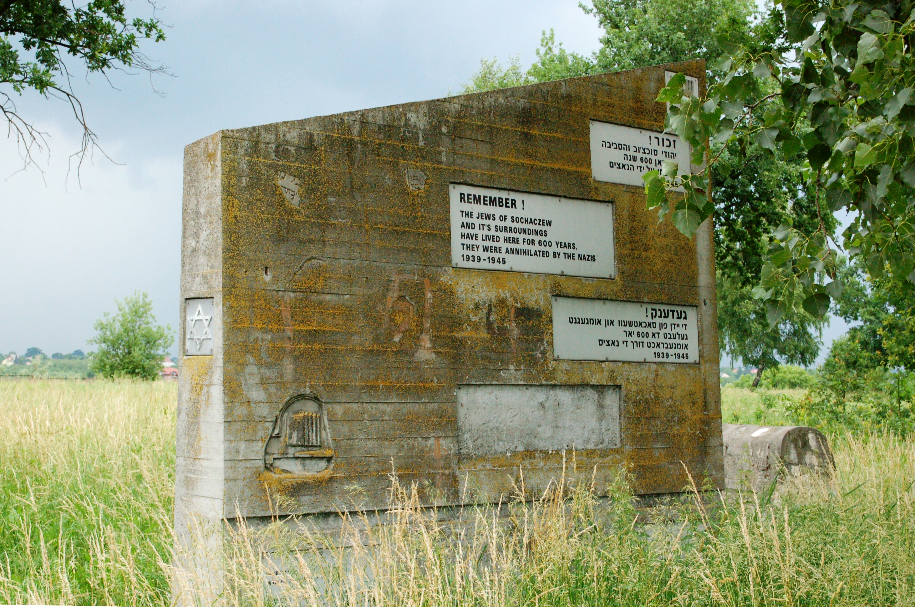 Sochaczew